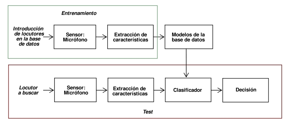 Esquema de un reconocedor de locutores